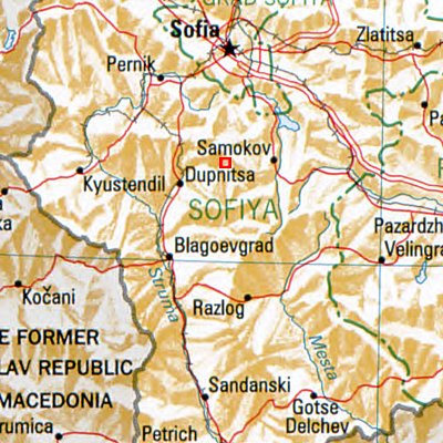 Saparewa Banja - Lage des Ortes in Bulgarien